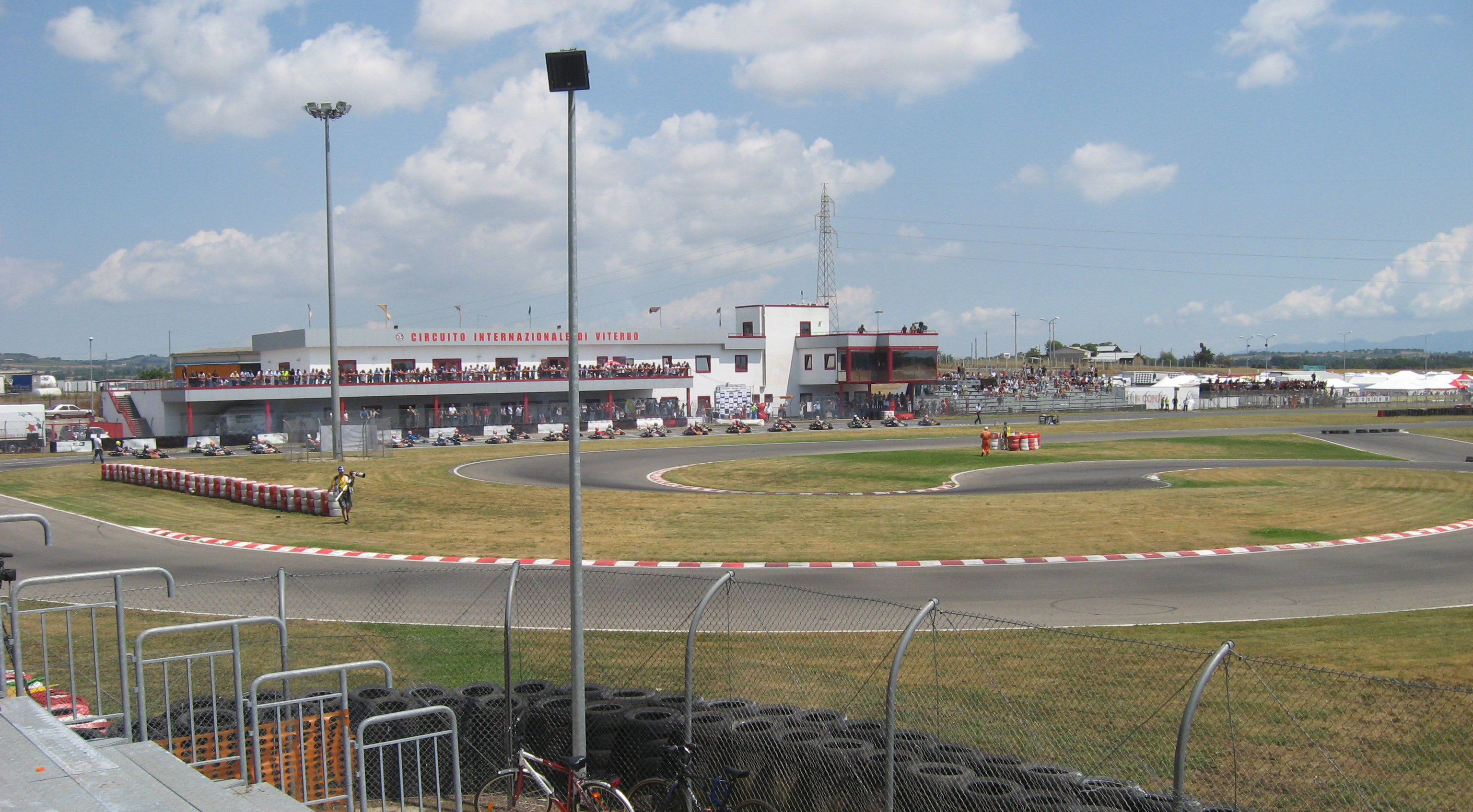 Particolare del circuito rappresentante la doppia curva denominata "Chiocciola"